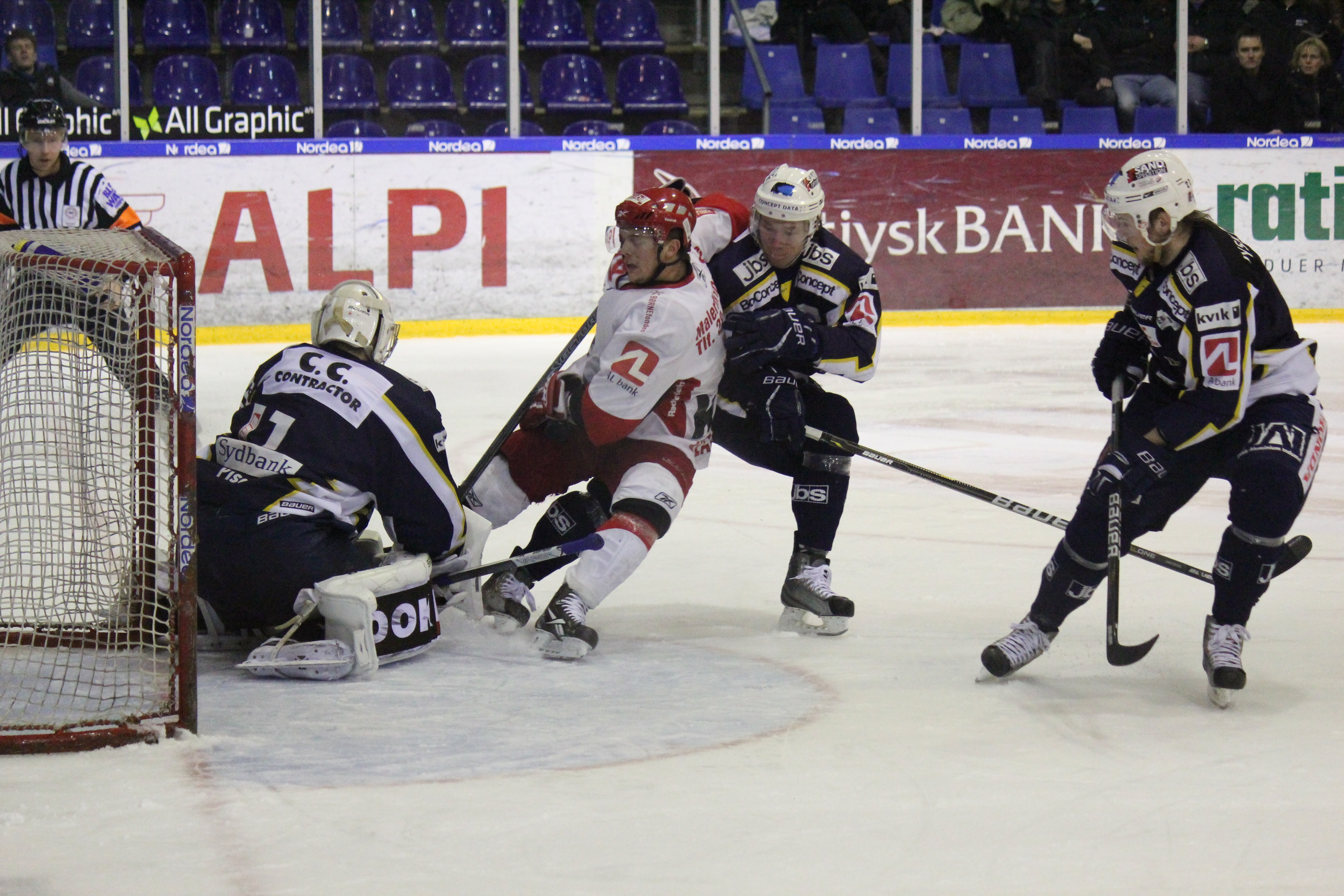 Spillere under kamp mellem Herning Blue Fox og Rødovre Mighty Bulls - 15/3-11. Herning vandt kampen 4-0